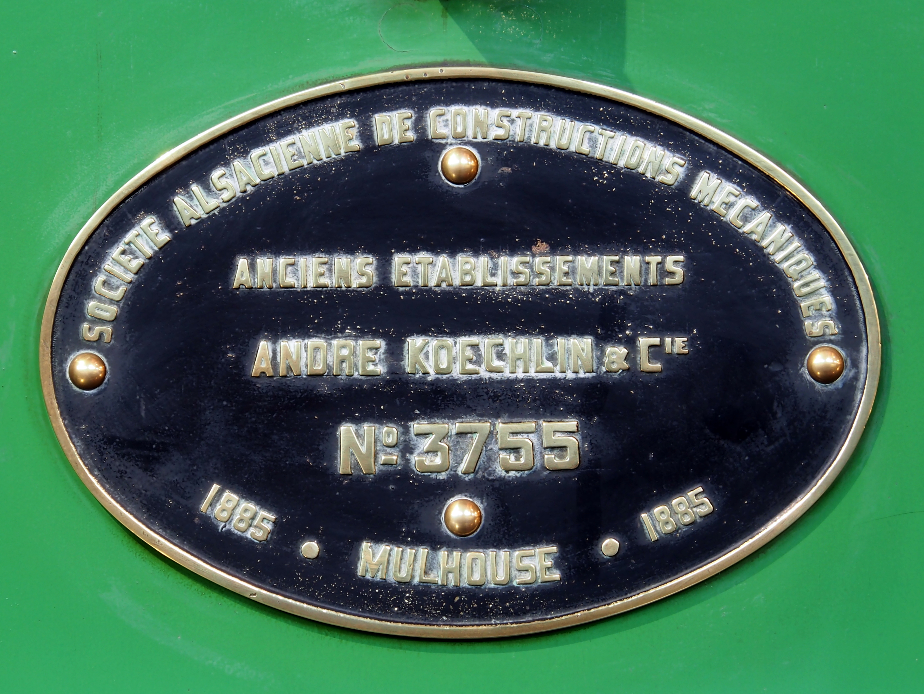 Photographed at Cité du train, Mulhouse, France.